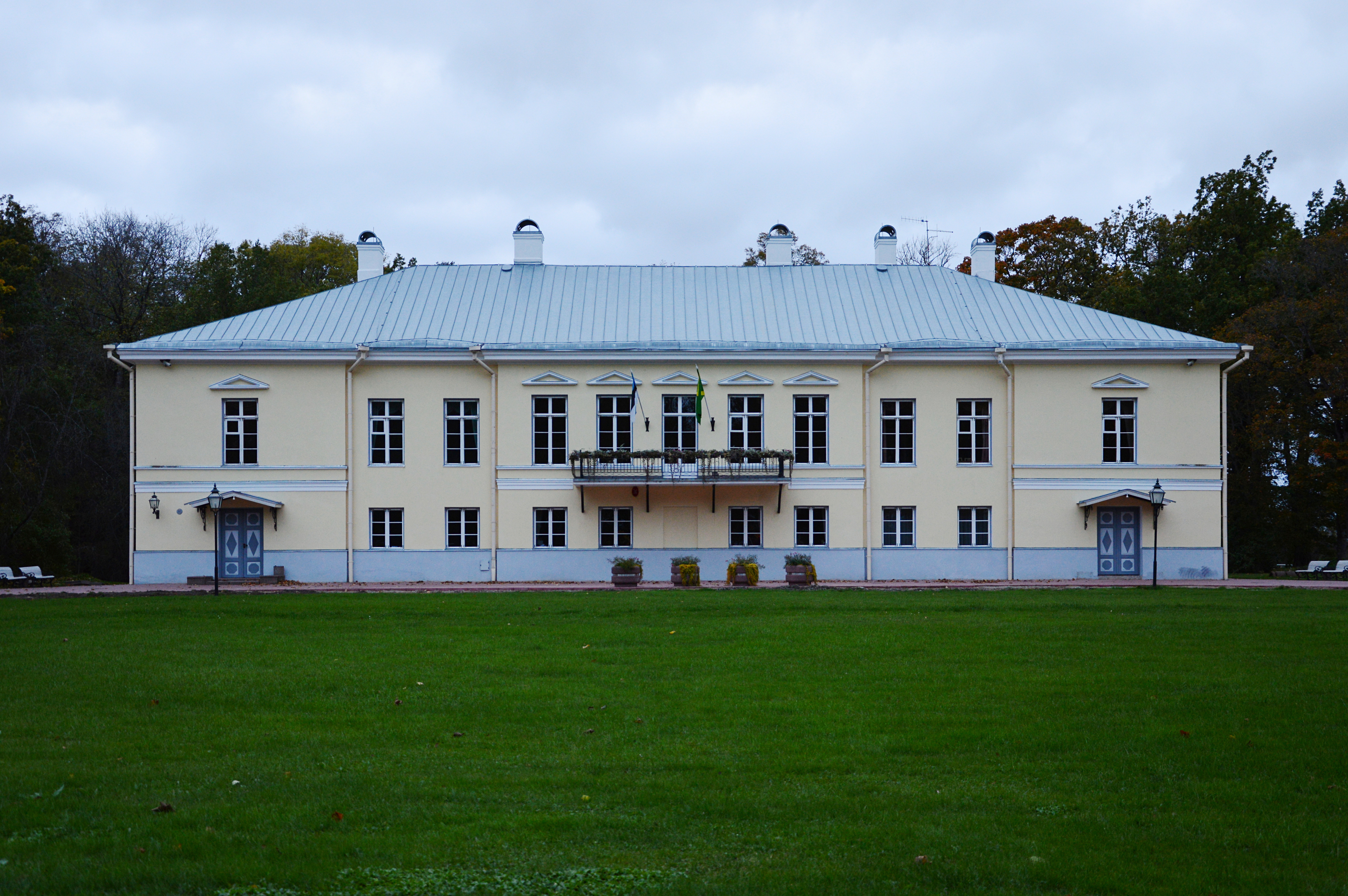 Mäetaguse mõisa peahoone.